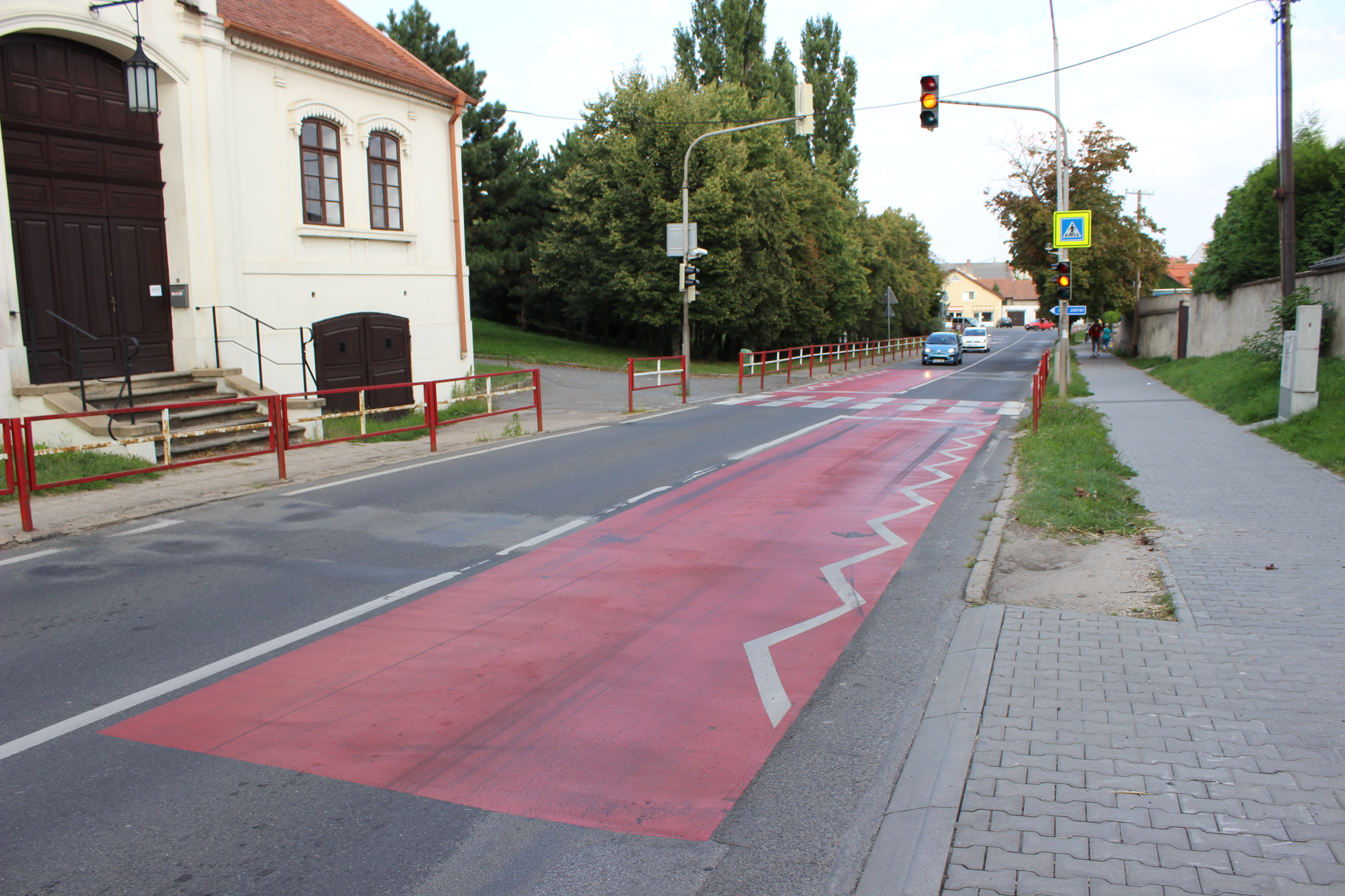 Rocbinda před přechodem pro chodce před světelným signalizačním zařízením na Kostelecké ulici v Brandýse nad Labem (pohled od západu).